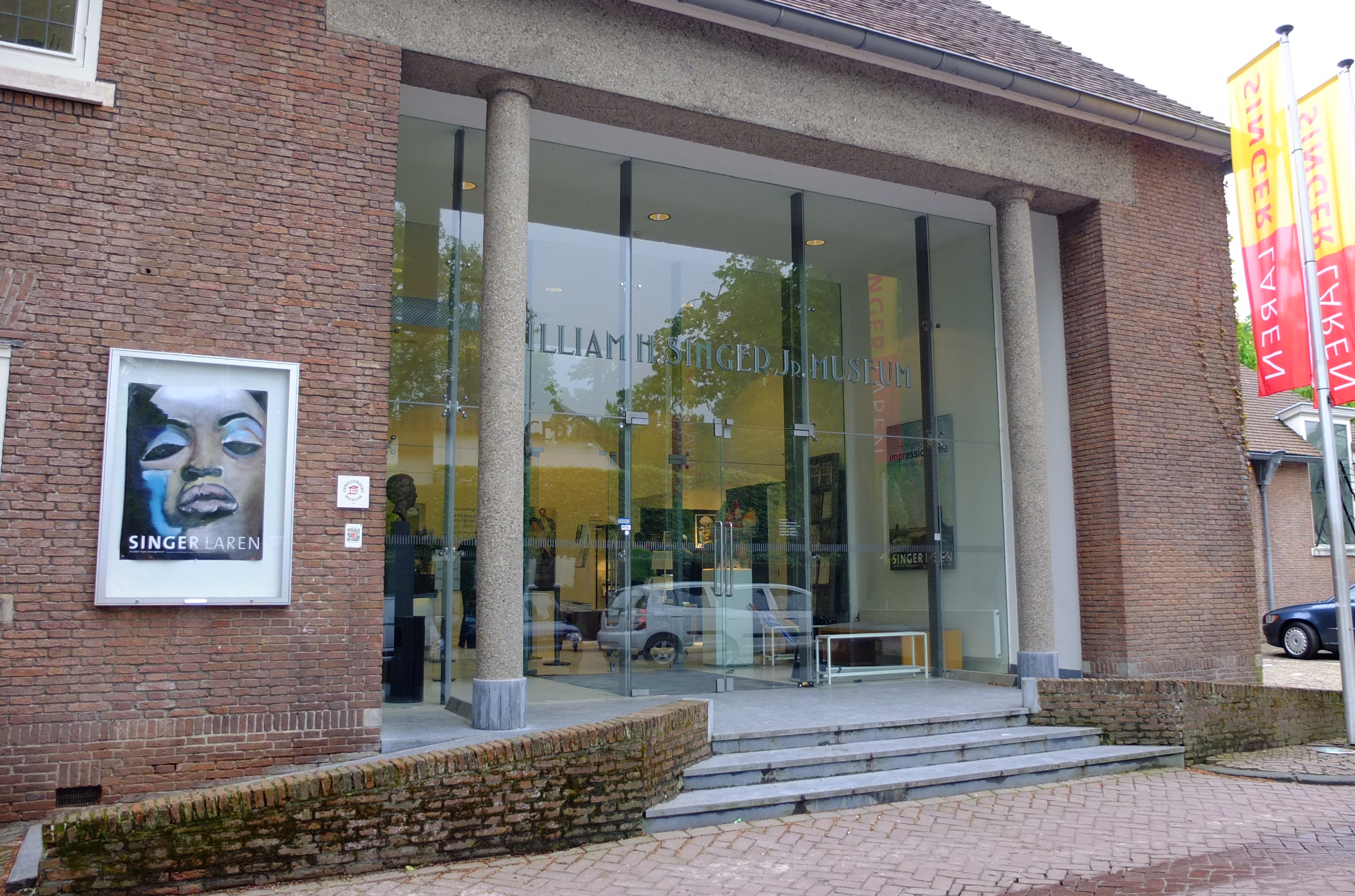 Singer Museum